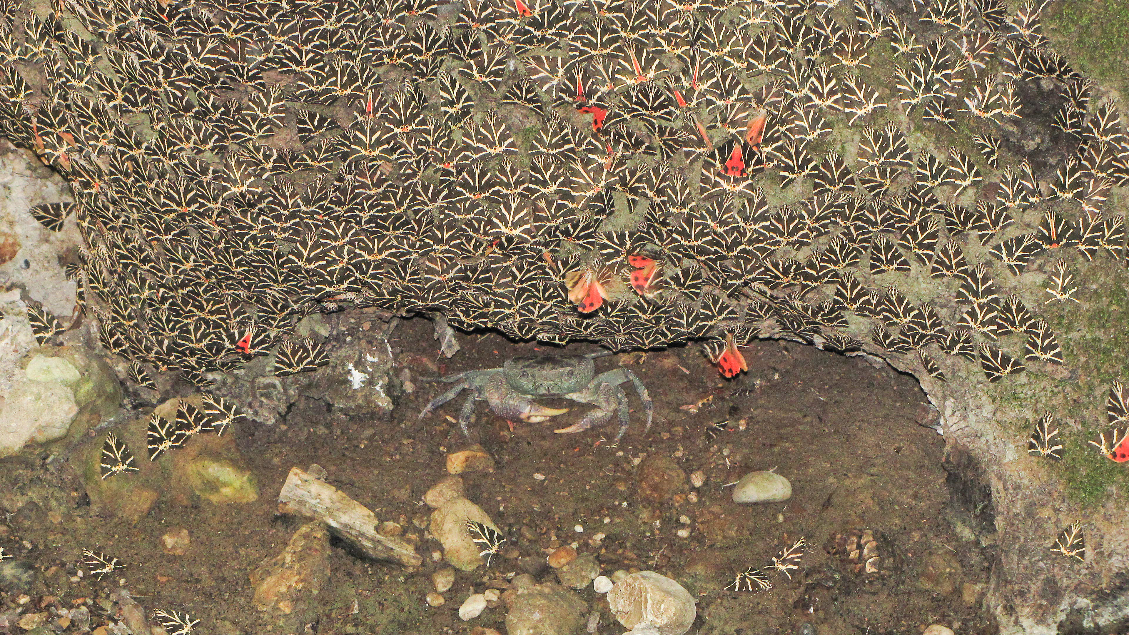 Im Tal der Schmetterlinge: Eine Krabbe wartet im Wasser auf Beute: Der Russische Bäre (Schmetterling), Rhodos.